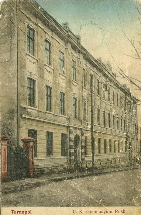 Будівля, Тернопільська Українська гімназія